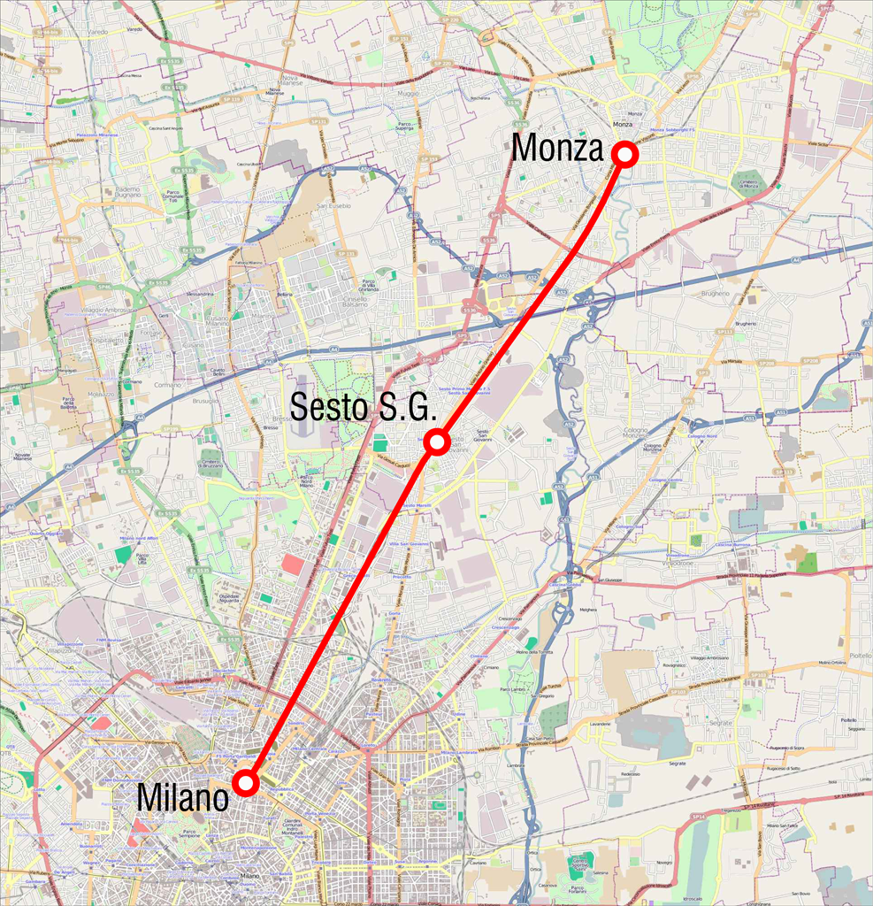 Mappa della ferrovia Milano-Monza all'epoca della costruzione (1840)